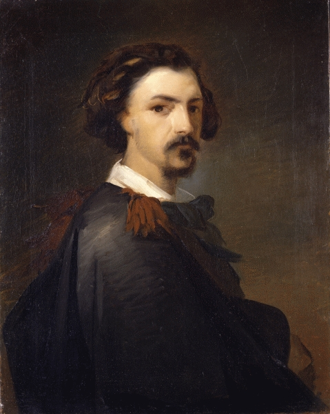 Autoritratto